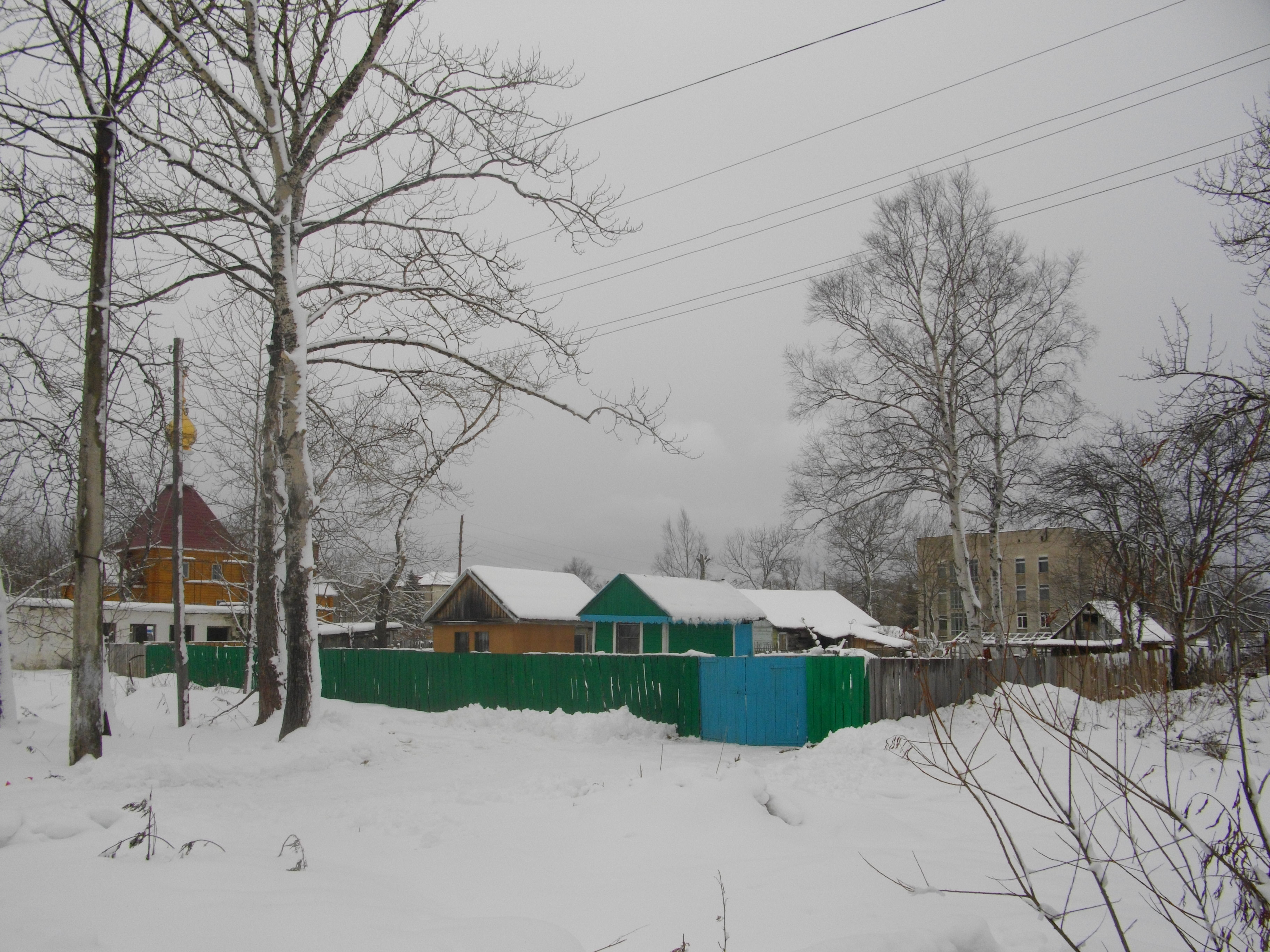 Город Анива (Сахалинская область)